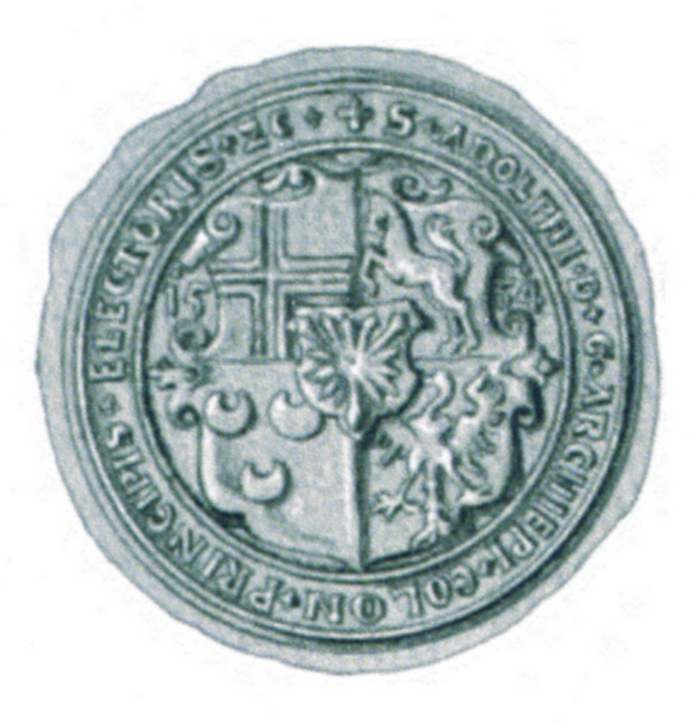 Siegel des Adolf von Schaumburg (* 19. Januar 1511; † 20. September 1556 in Brühl) war als Adolf III. von 1547 bis 1556 Erzbischof des Erzbistums Köln. Adolf III. war ein Sohn des Grafen Jobst von Schaumburg und Holstein-Pinneberg und der Maria von Nassau-Dillenburg. Er hatte noch zwei ältere und sieben jüngere Brüder, wie auch zwei Schwestern. Das Siegel stammt aus der Zeit um 1546-1556.